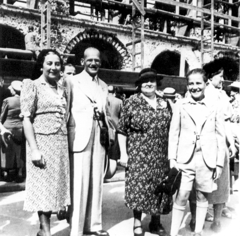 Od lewej: Wanda, Adam, Sofia i Ludwik (Louis-Christophe) Zamenhofowie, ok. 1935 r.